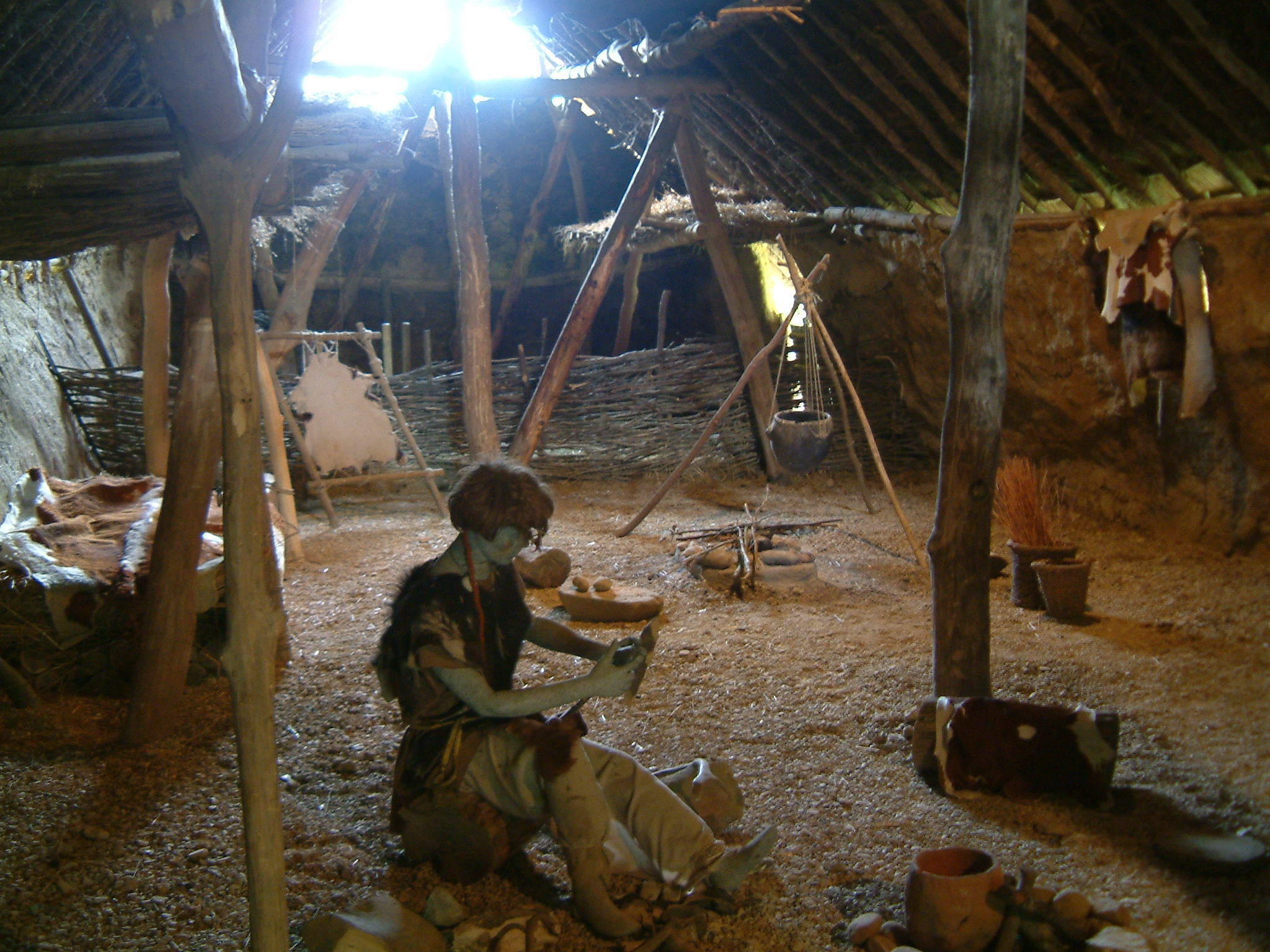 Archéodrome de Beaune, Merceuil, Bourgogne, FRANCE. Vue de l'intérieur d'une habitation reconstituée.